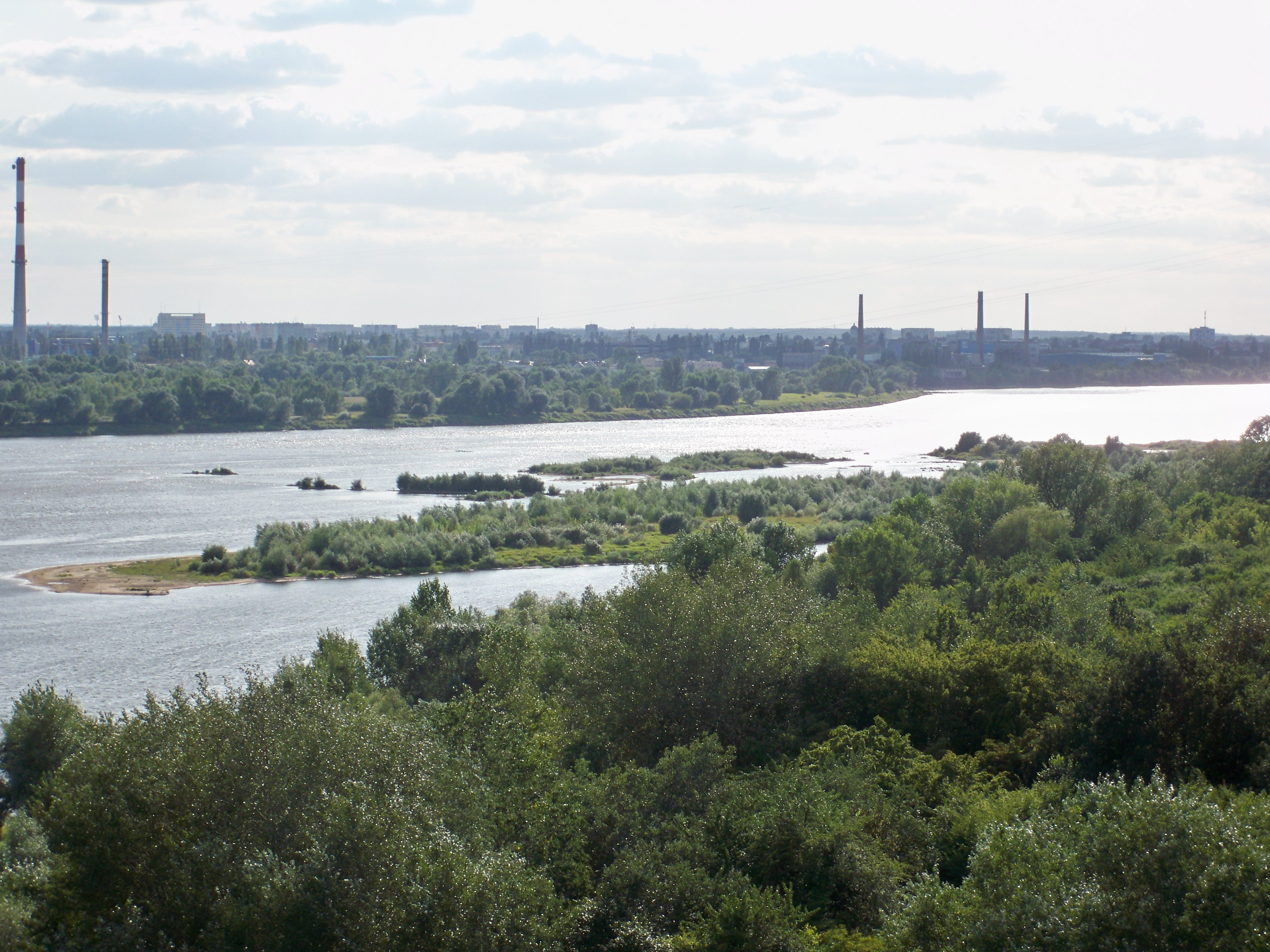 Wisła we Włocławku (2009 r.)